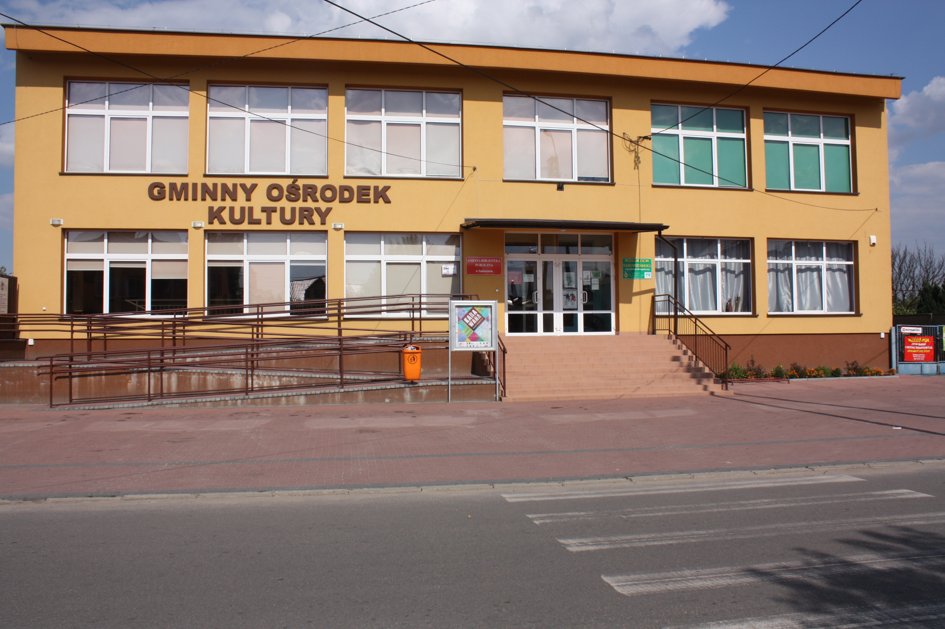 Sadowne, Gminny Ośrodek Kultury w Sadownem ul. Kościuszki 35